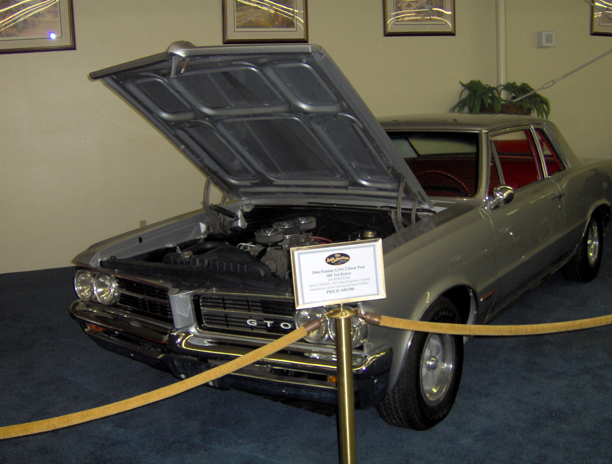 1964 Pontiac GTO 389 Tri-Power